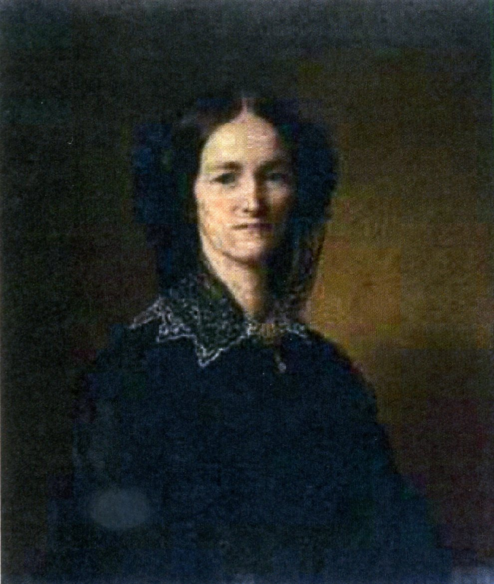 Porträt der Adolphine Zais, geb. Floret, gemalt von Orth